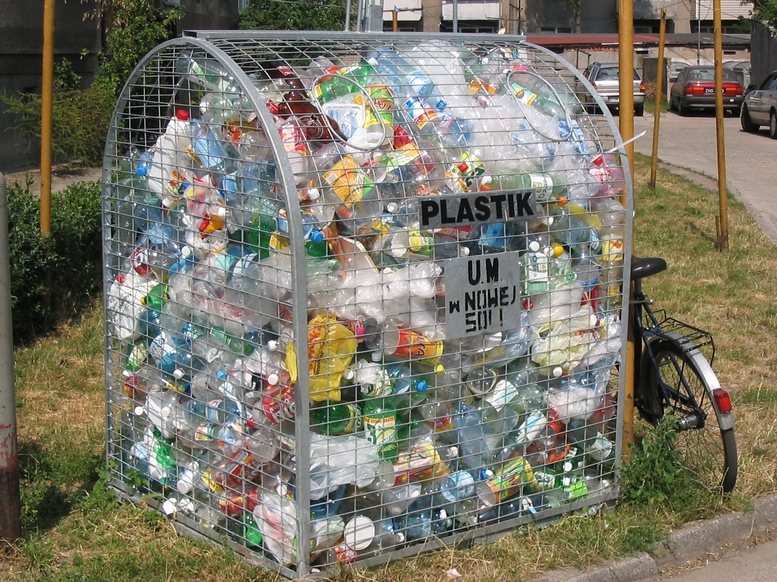 pojemnik na zużyty plastik